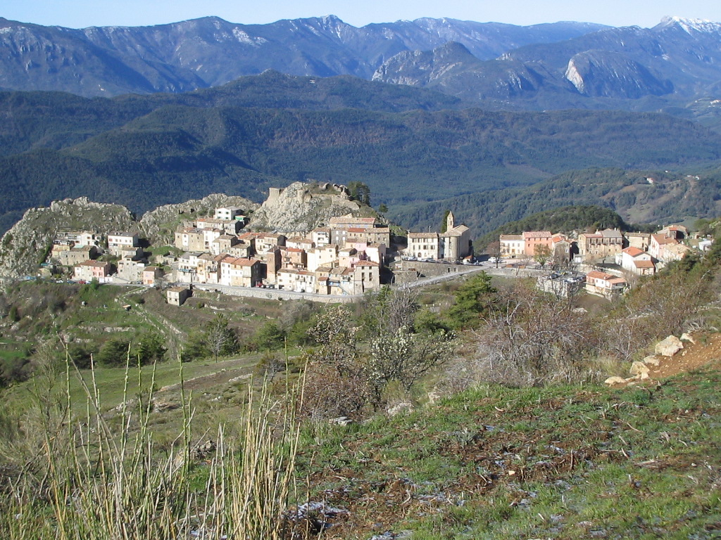 Tres jolie vue generale d'Ascros.